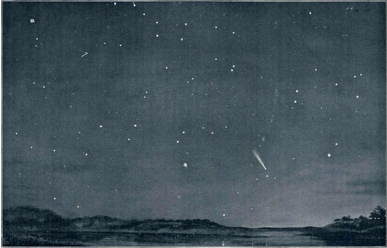 Halleyev komet, kakor se je videl dne 25. maja t. 1. ob svoji največji svetlobi.